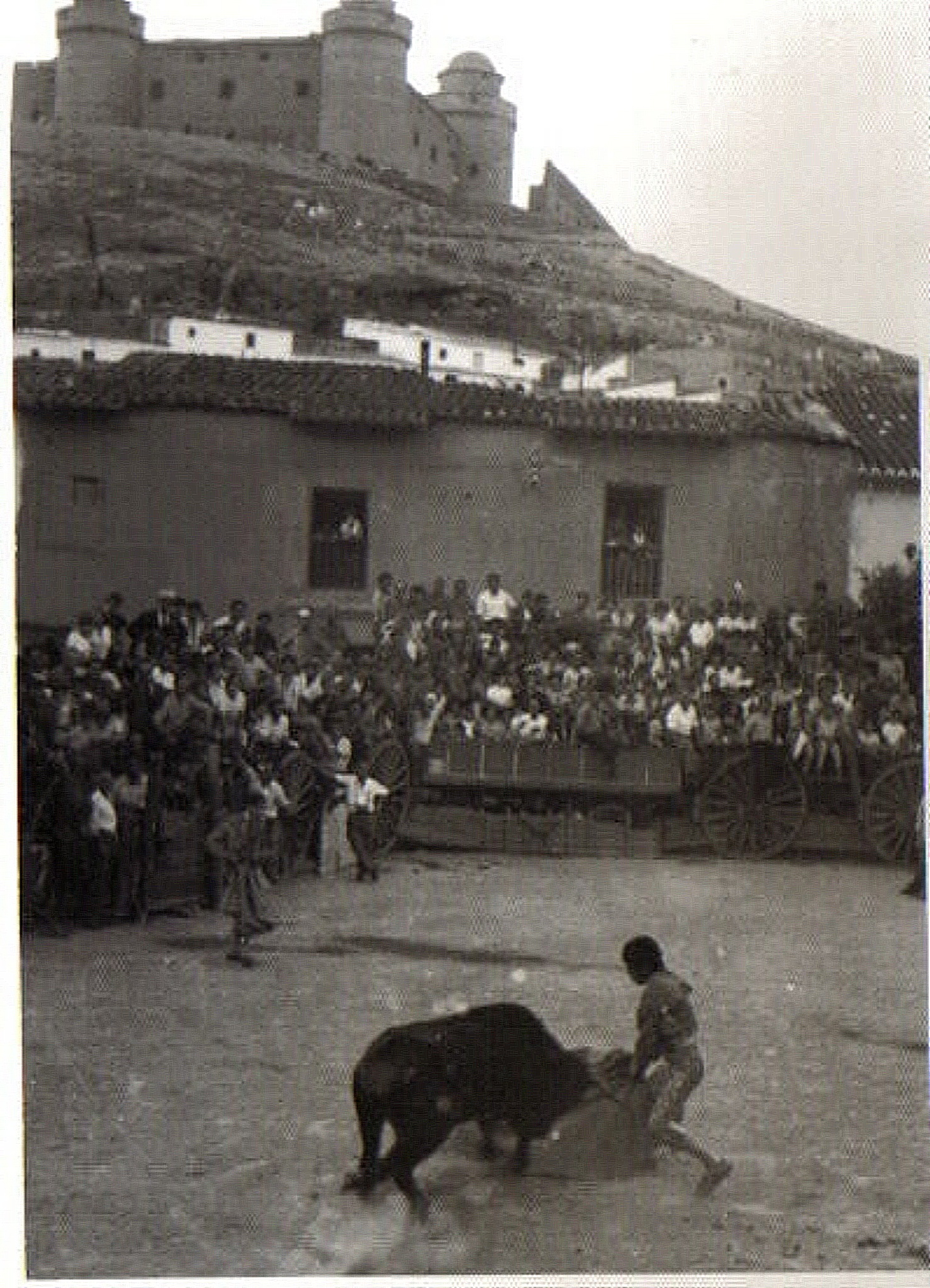 Toreo de novillos en la plaza de La Calahorra en las fiestas de Agosto.